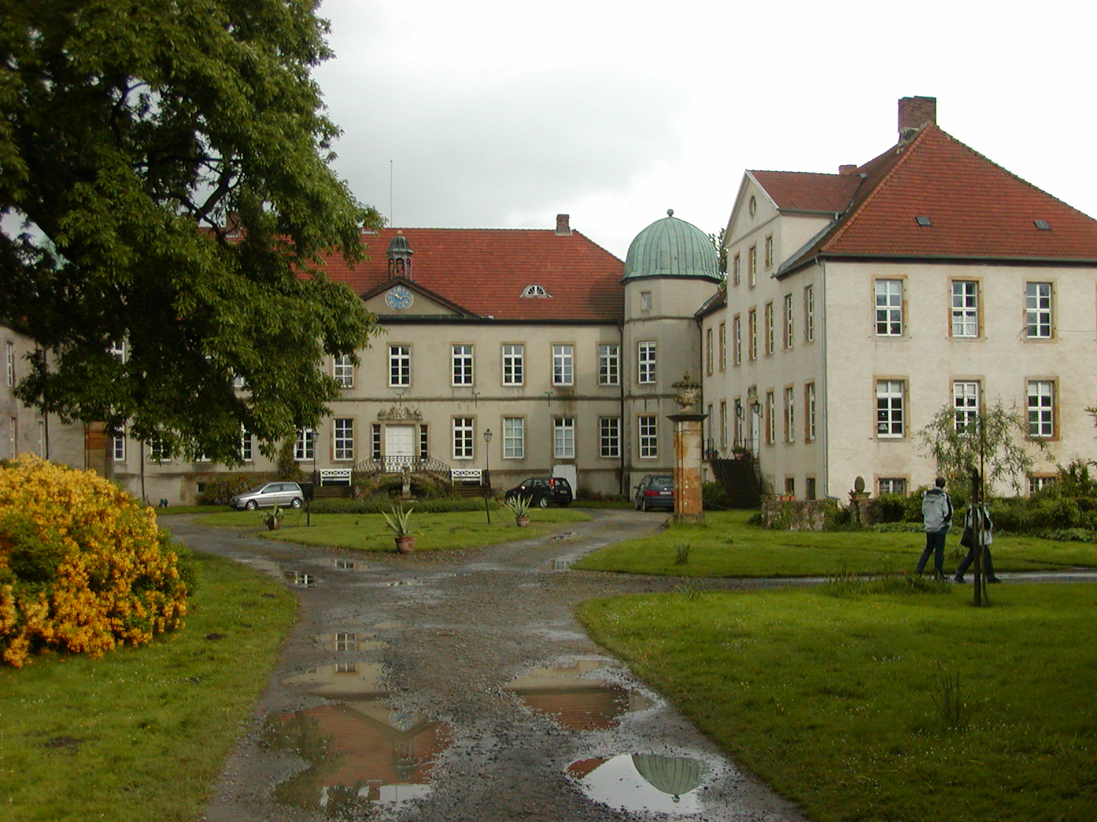 Schloss Hünnefeld in Bad Essen Sonstiges: ...